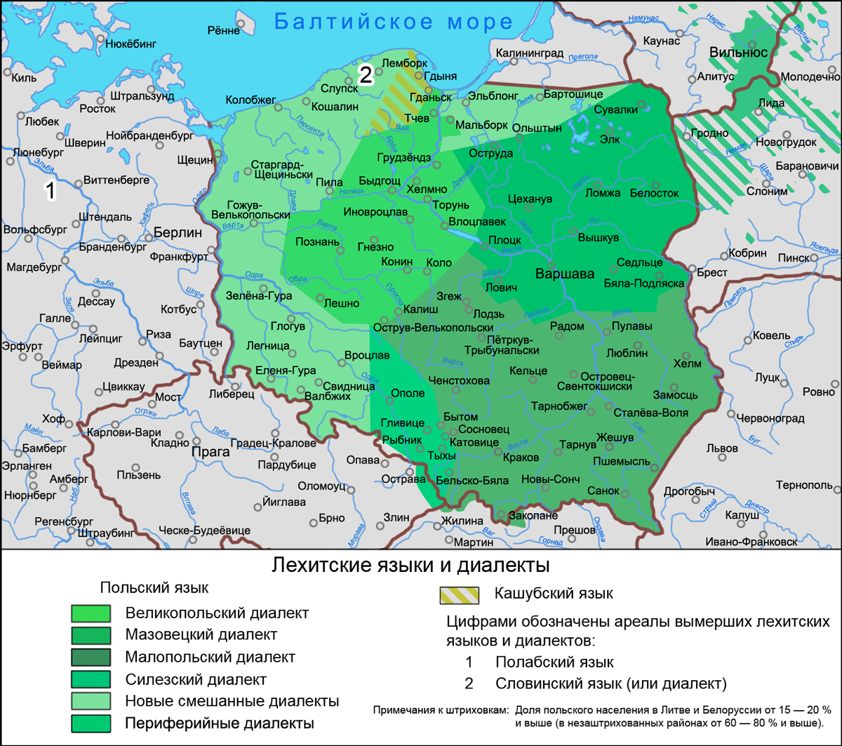 Карта лехитских языков (включая диалекты польского языка). Источники: Gwary polskie. Przewodnik multimedialny pod redakcją Haliny Karaś. Ugrupowania dialektów i gwar polskich — размещение диалектов польского языка; Национальный статистический комитет Республики Беларусь — численность населения, его состав по национальностям и языку в областях республики Беларусь; Baza demografia. Wyniki Narodowego Spisu Powszechnego Ludności i Mieszkań 2002 w zakresie deklarowanej narodowości oraz języka używanego w domu — численность, национальный состав и язык населения в воеводствах и повятах Польши; Polacy na Litwie.